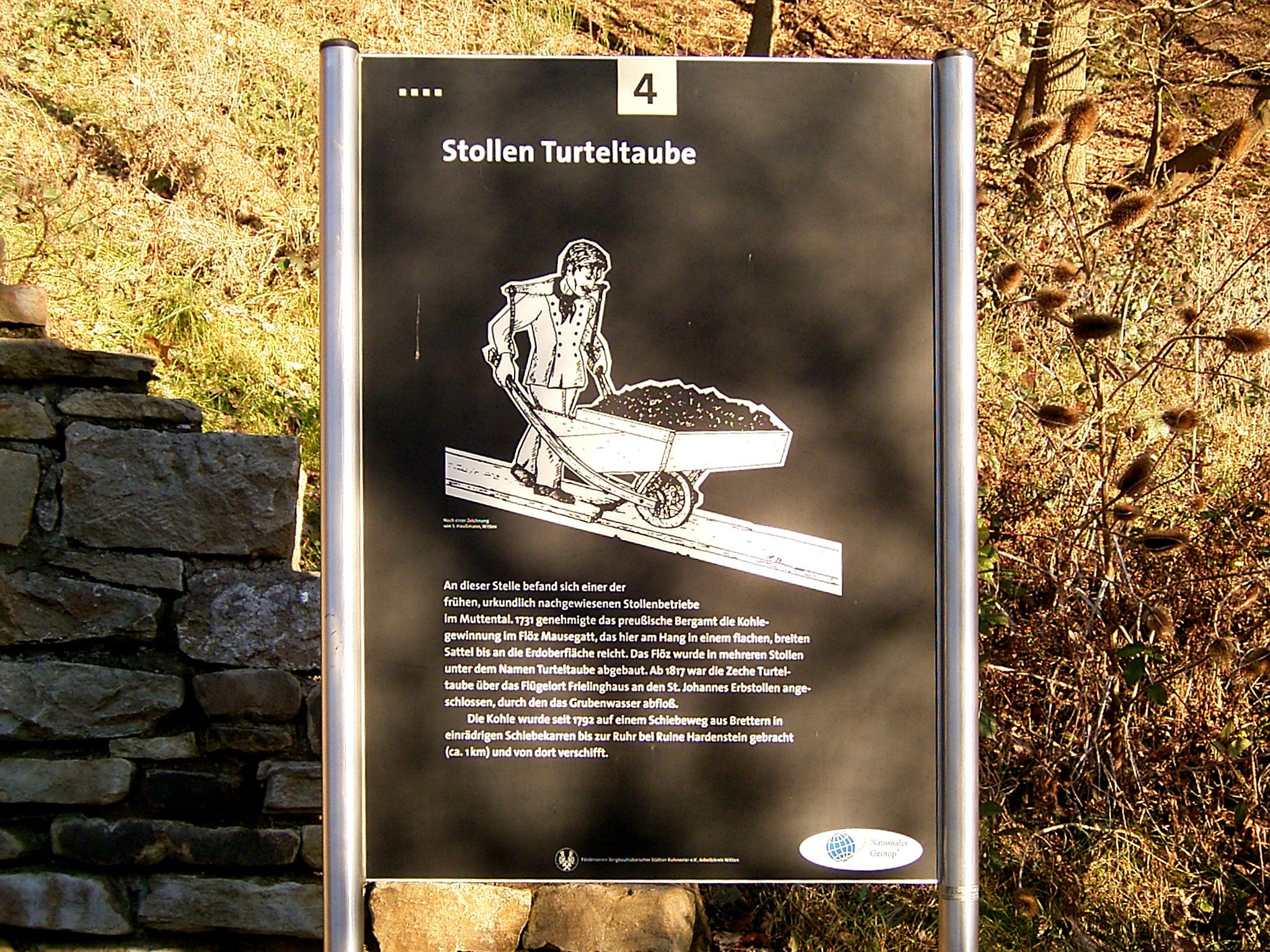 Bergbauwanderweg Muttental in Witten